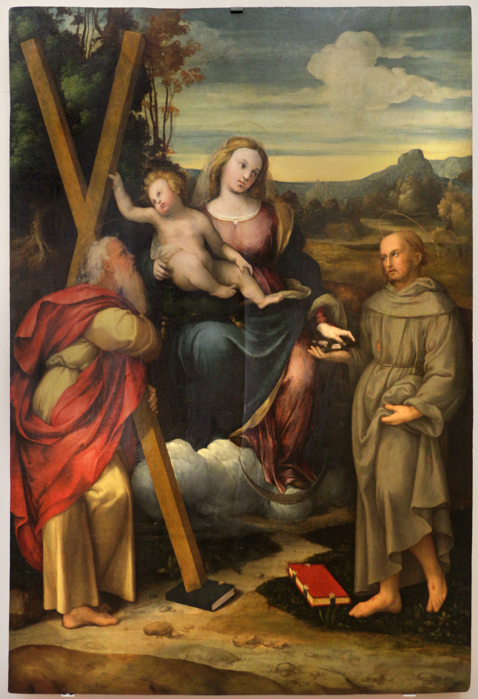 Palazzo dei Diamanti (Ferrara) This is a photo of a monument which is part of cultural heritage of Italy.